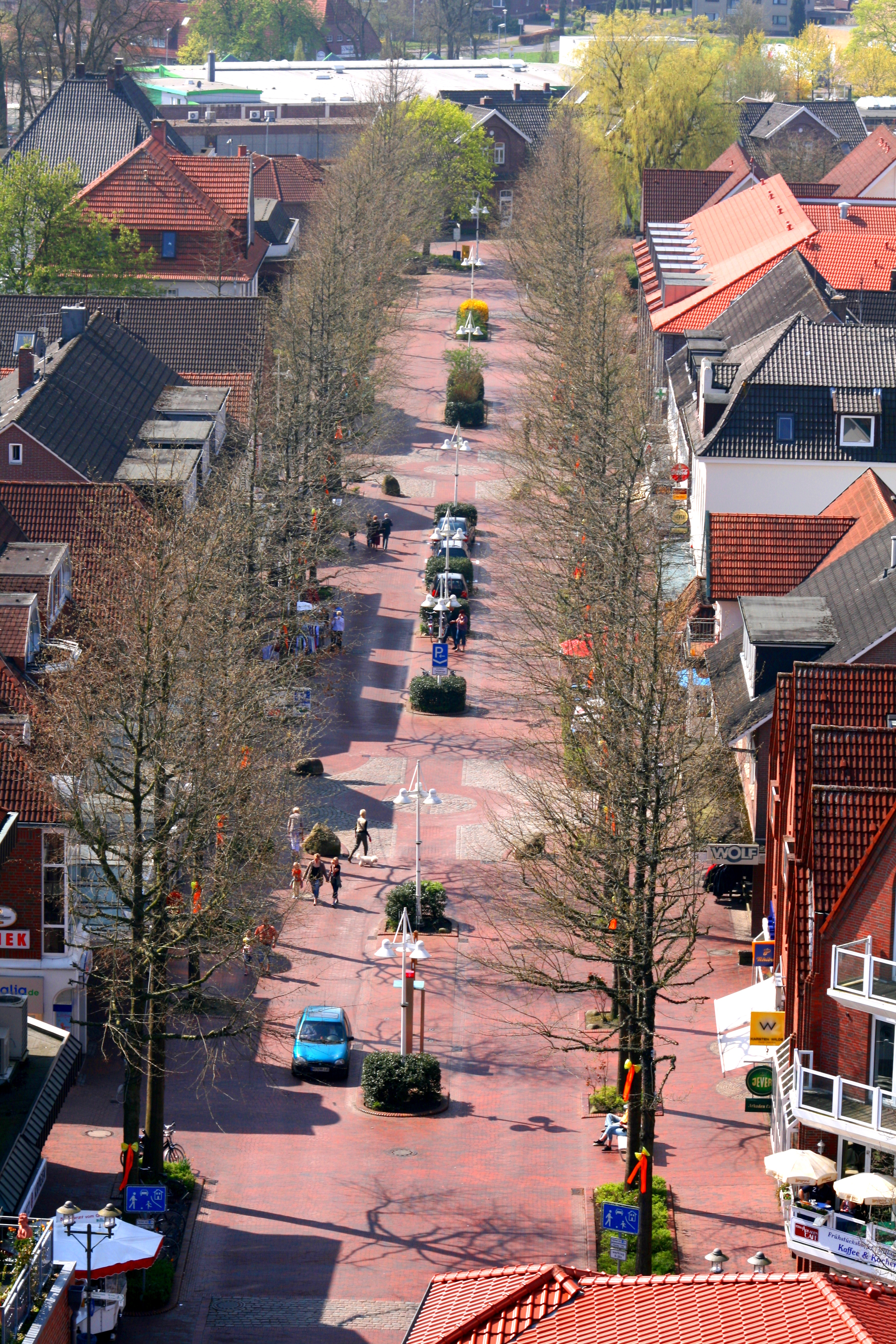 Luftbild der Bahnhofstraße in Bad Zwischenahn (aufgenommen vom Wasserturm)